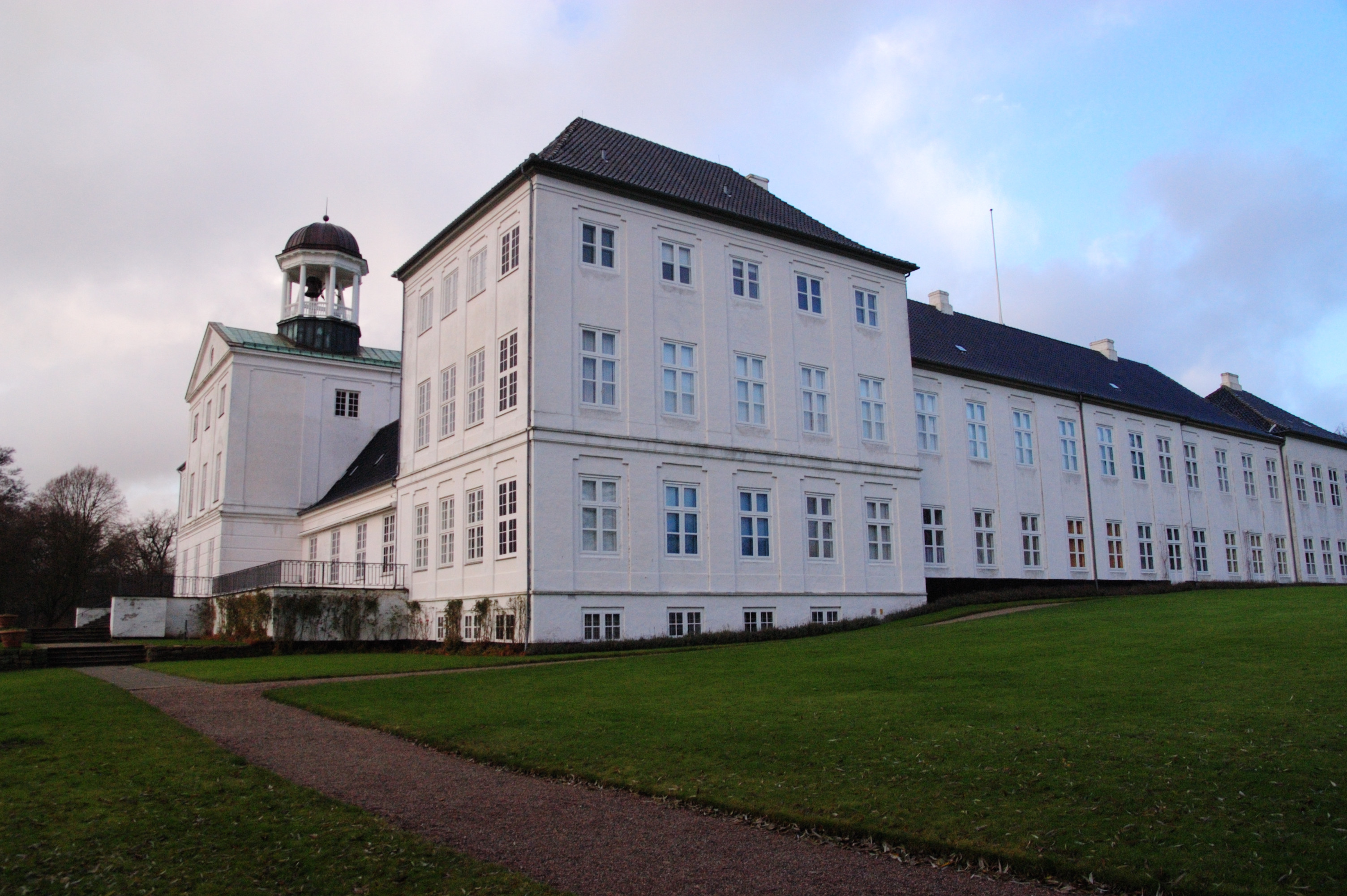 Gråsten Palace, Denmark